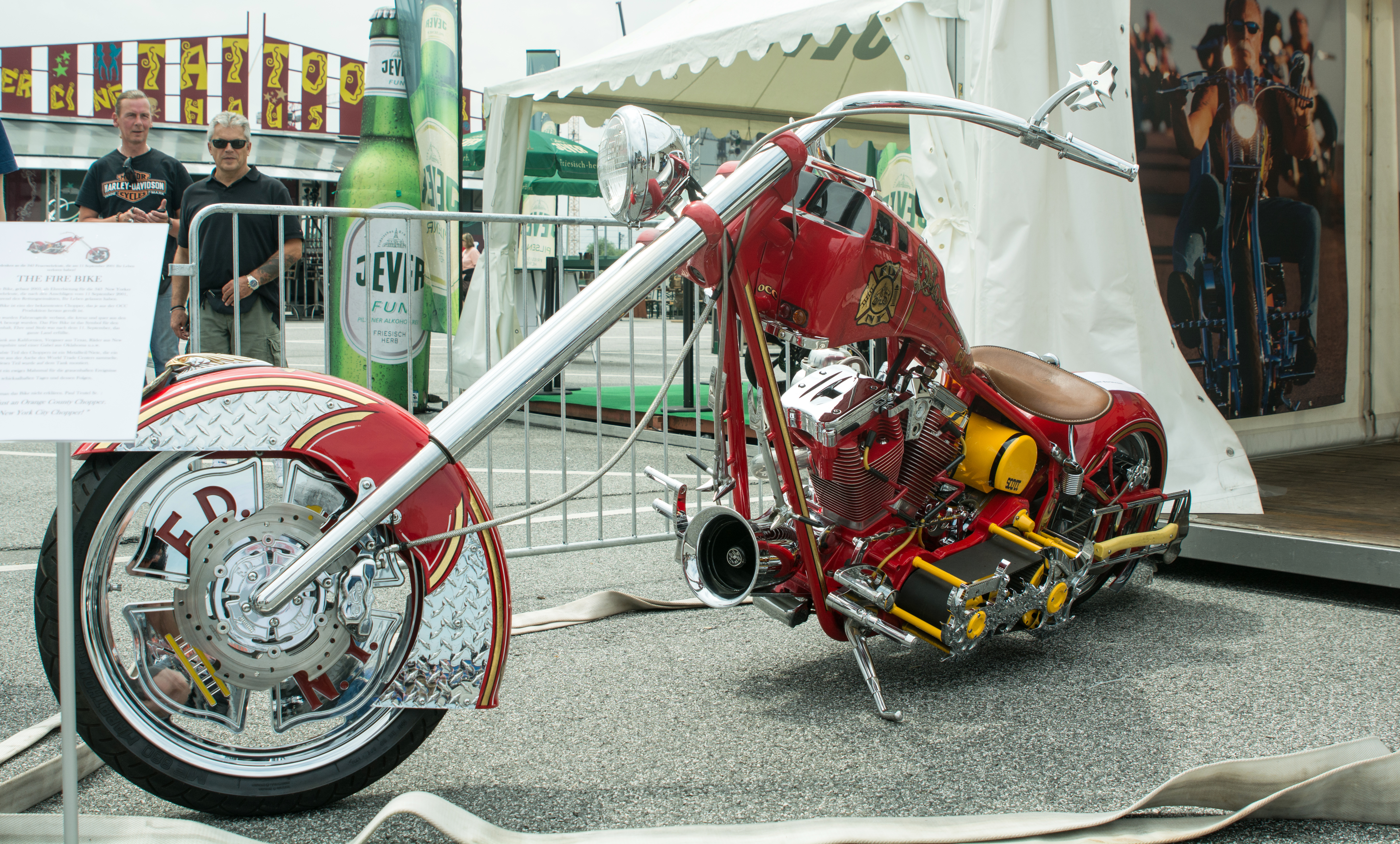 The Fire Bike in Hamburg